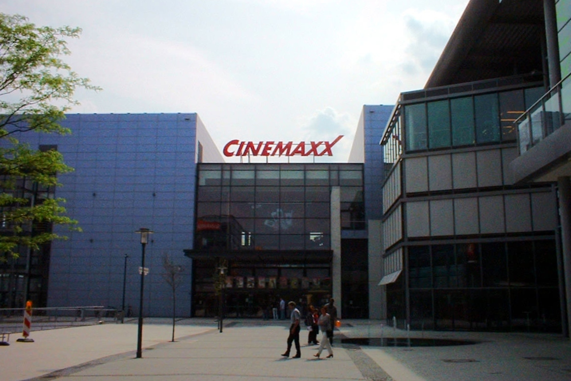 Cinemaxx Bielefeld.